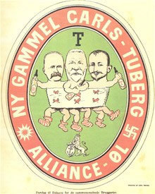 Satire i Klods-Hans 1903 i anledning af samarbejdsaftalen mellem Gl. og Ny Carlsberg og De forenede Bryggerier med Tuborg i spidsen. Til højre DfB/Tuborgs direktør Benny Dessau, i midten Carl Jacobsen fra Ny Carlsberg og til venstre S.A. von der Aa Kühle fra Gl. Carlsberg. Gl. og Ny Carlsbergs logoer er med (stjerne og svastika).